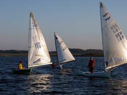 Europe dinghy and Finn dinghies. Ydernæs, Denmark. 2006.